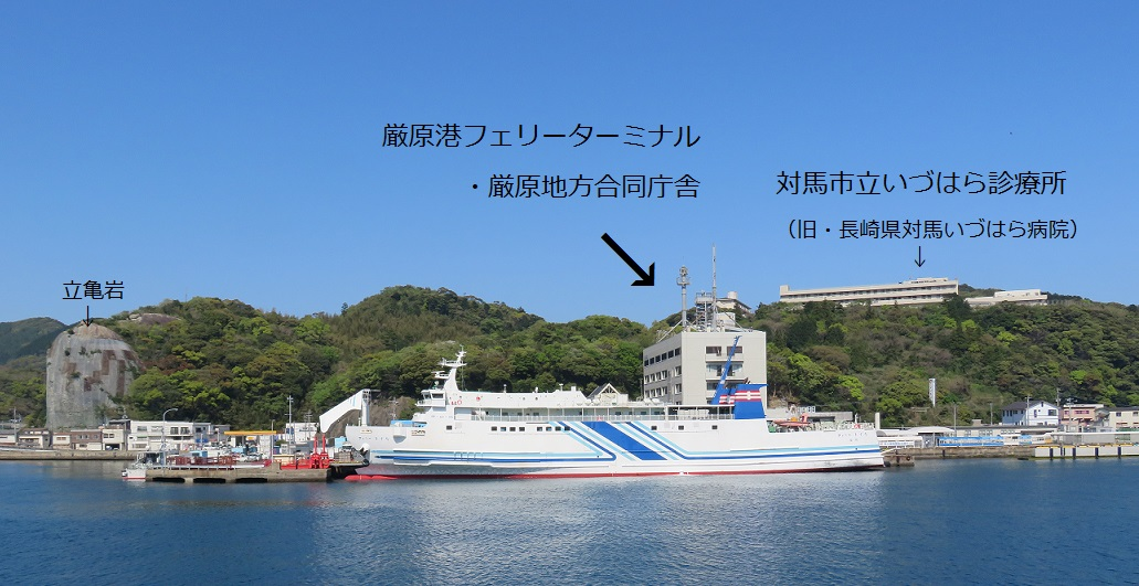 厳原港フェリーターミナル